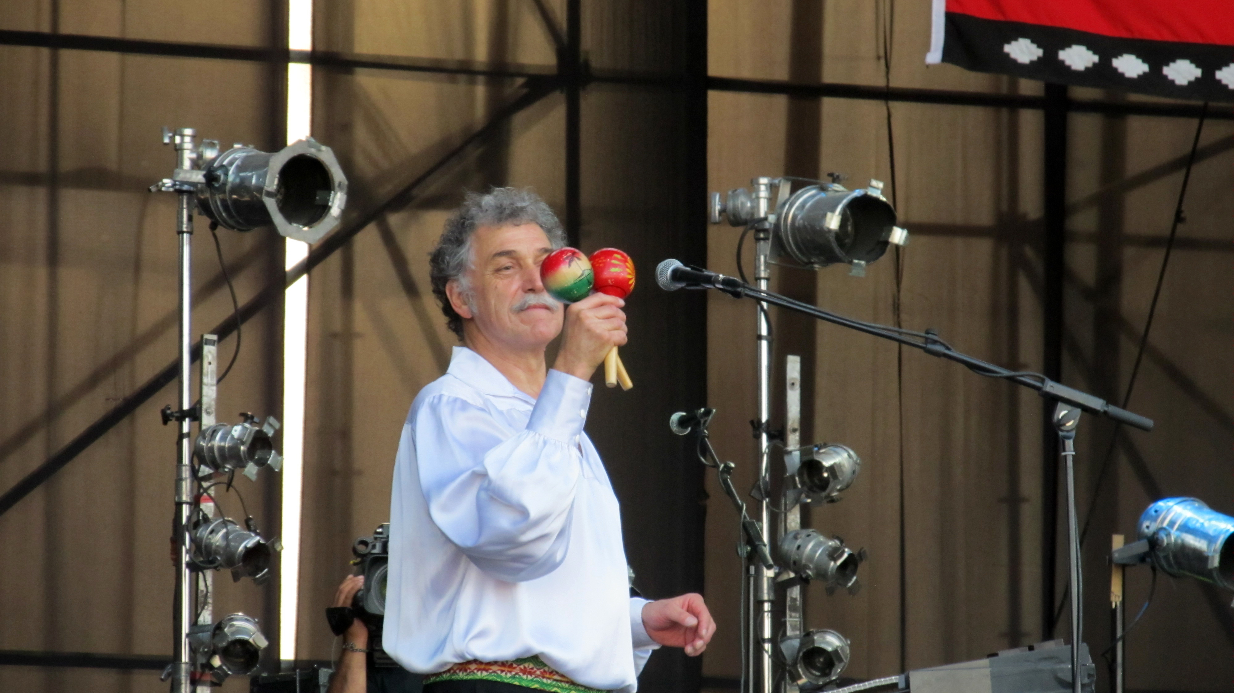 Claudio Parra, integrante de Los Jaivas, en 2012.